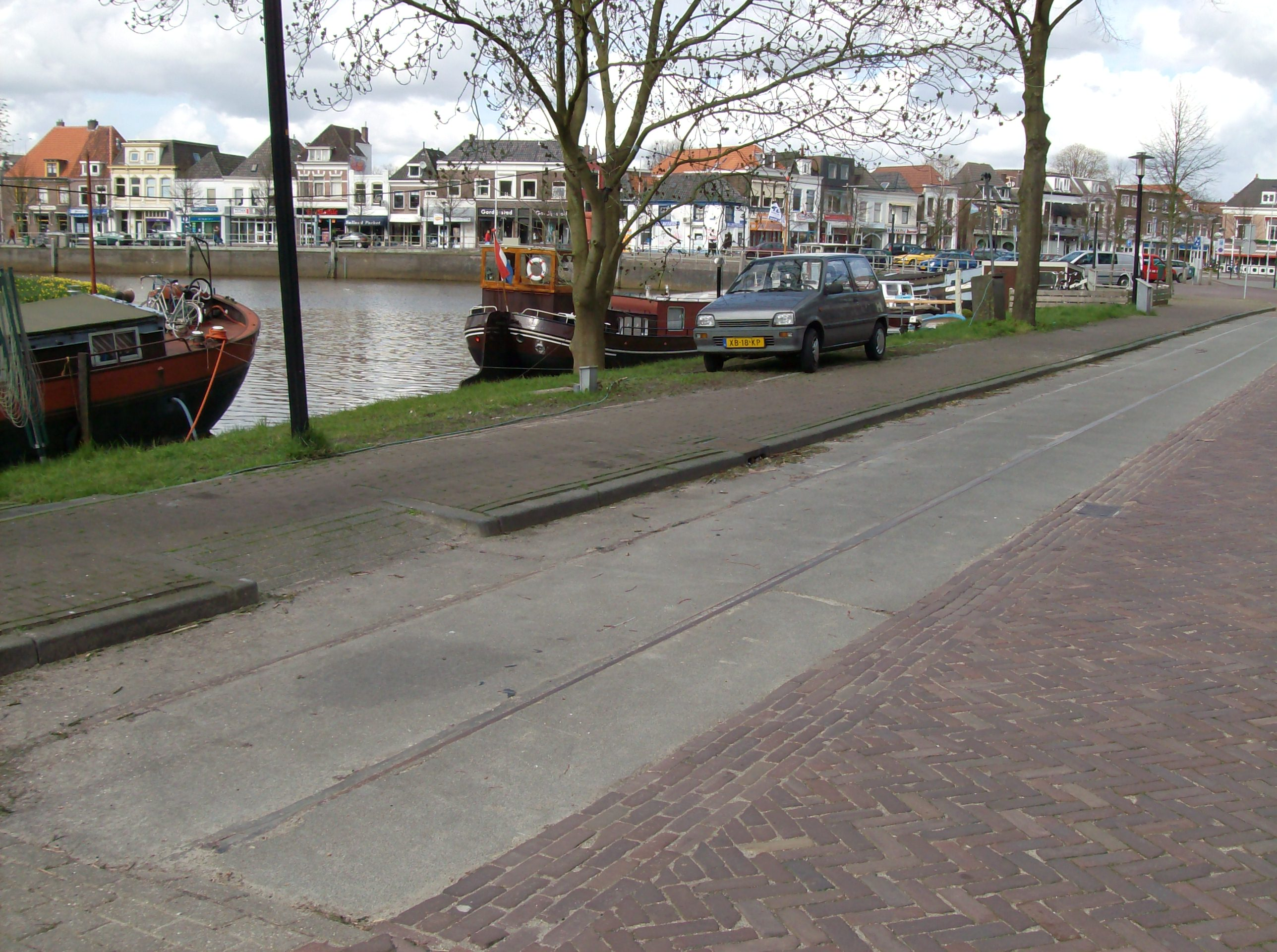 Laatste rails van de Dedemsvaartsche Stoomtramweg Maatschappij